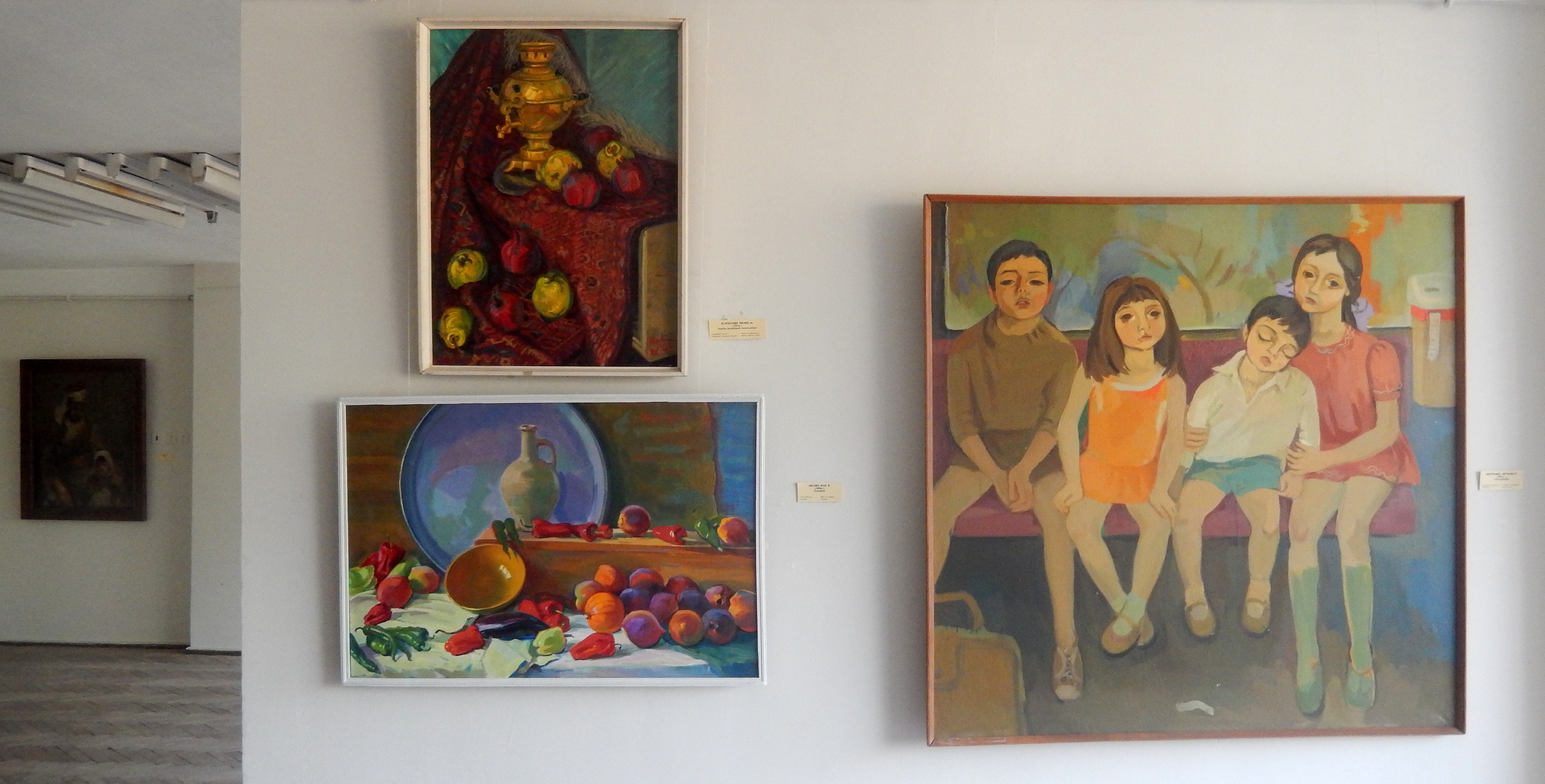 Վանաձորի կերպարվեստի թանգարան 1/49